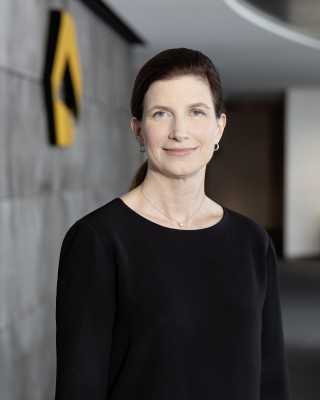 Bettina Orlopp, Vorstandsmitglied der Commerzbank